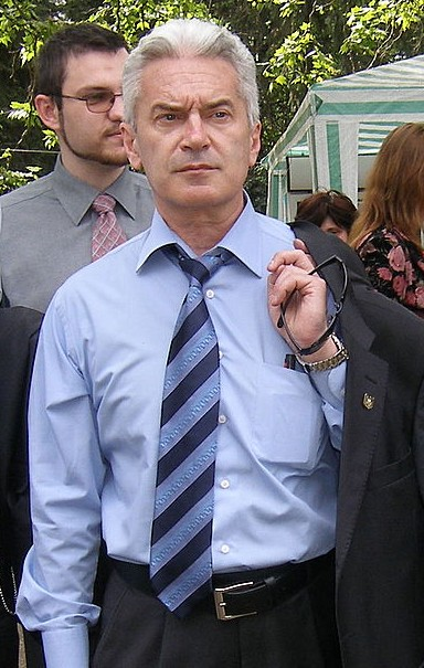 Volen Siderov, Bulgarian politician